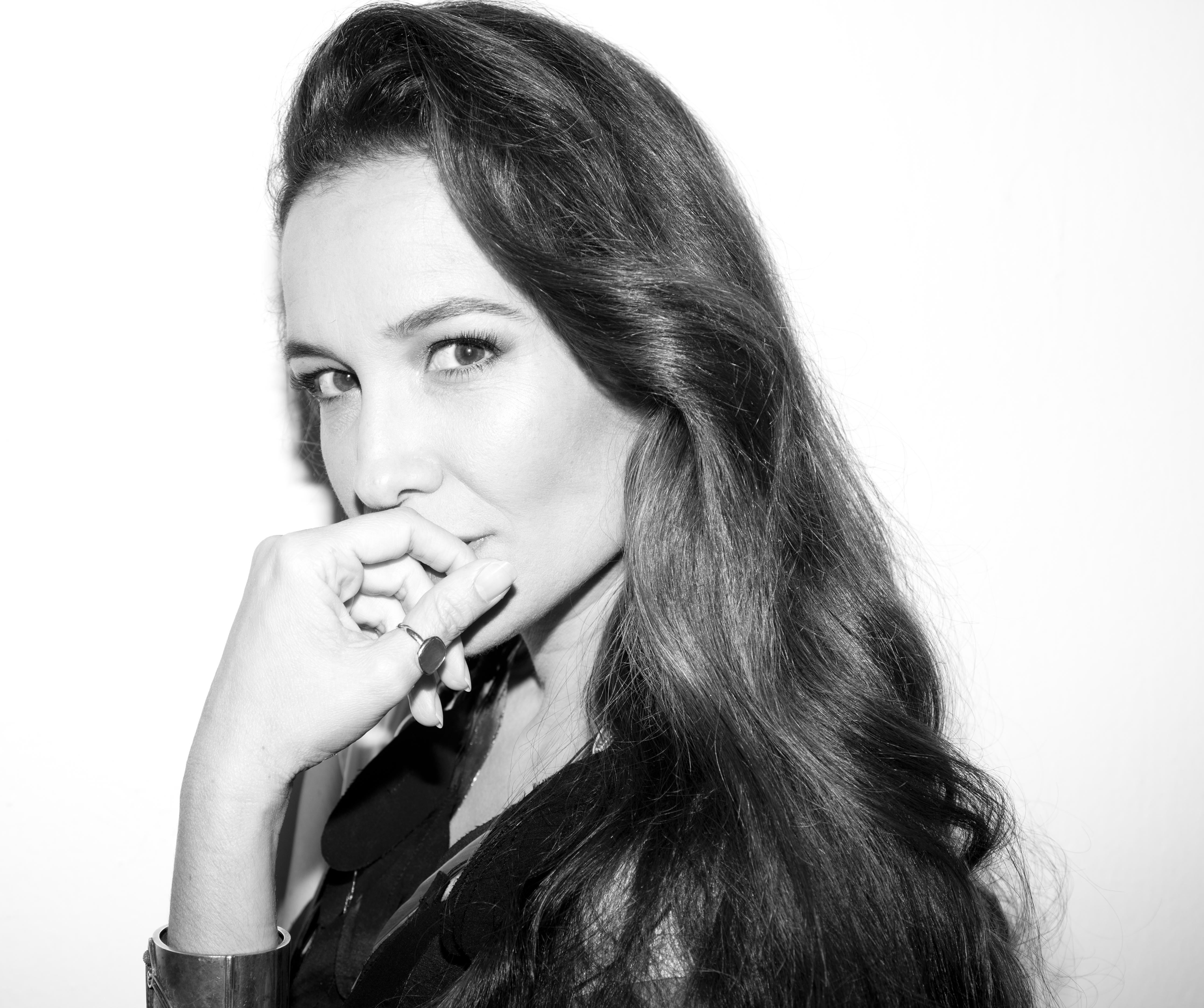 יעל אבקסיס היא שחקנית, דוגמנית ומנחת טלוויזיה ישראלית, זוכת פרס האקדמיה לטלוויזיה.